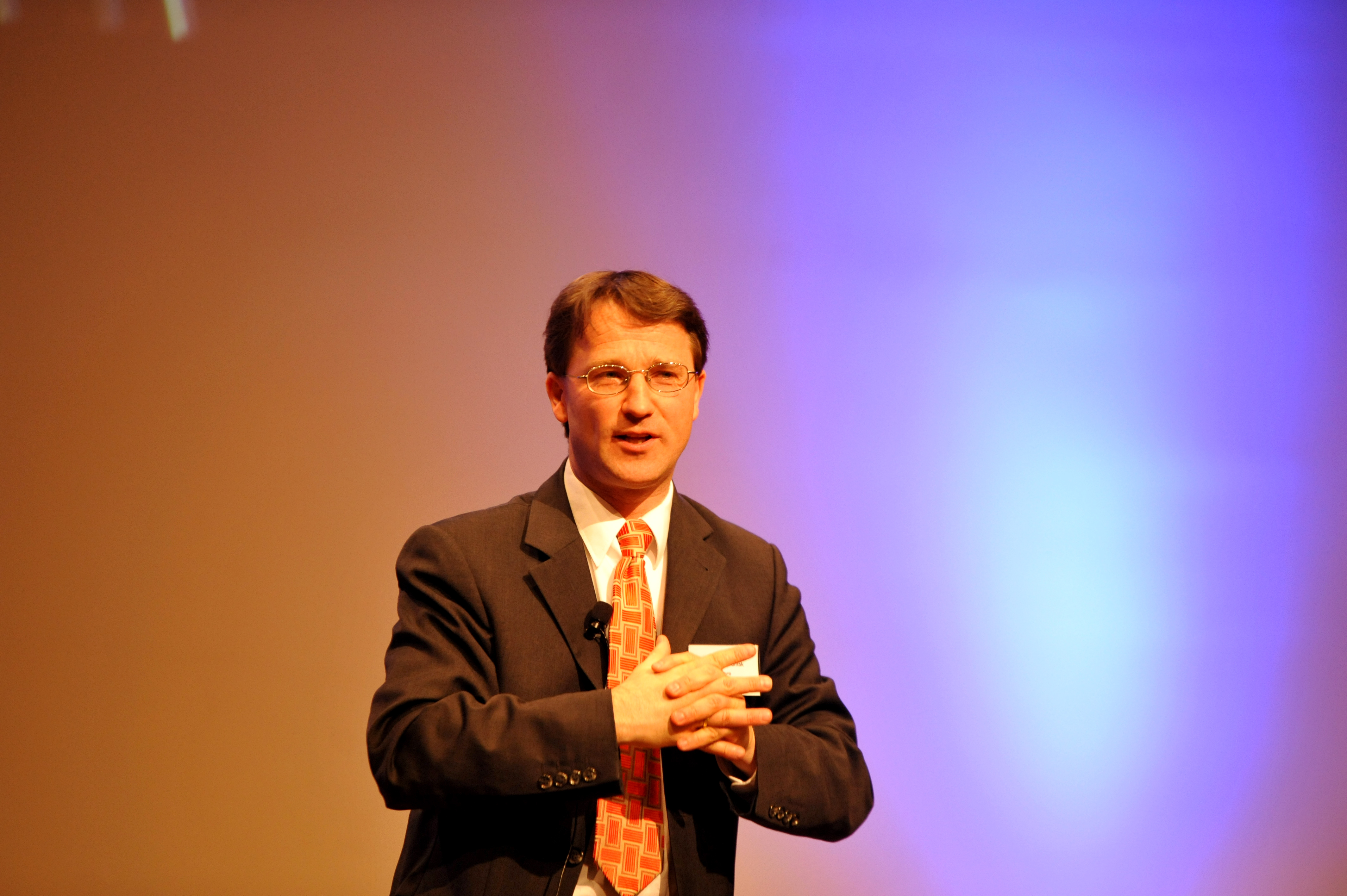 Clemens Sedmak, Professor für Philosophie an der Katholisch-Theologischen Fakultät Salzburg, beim Vortrag zum Thema Werte auf dem 7. Internationalen APS-Kongress